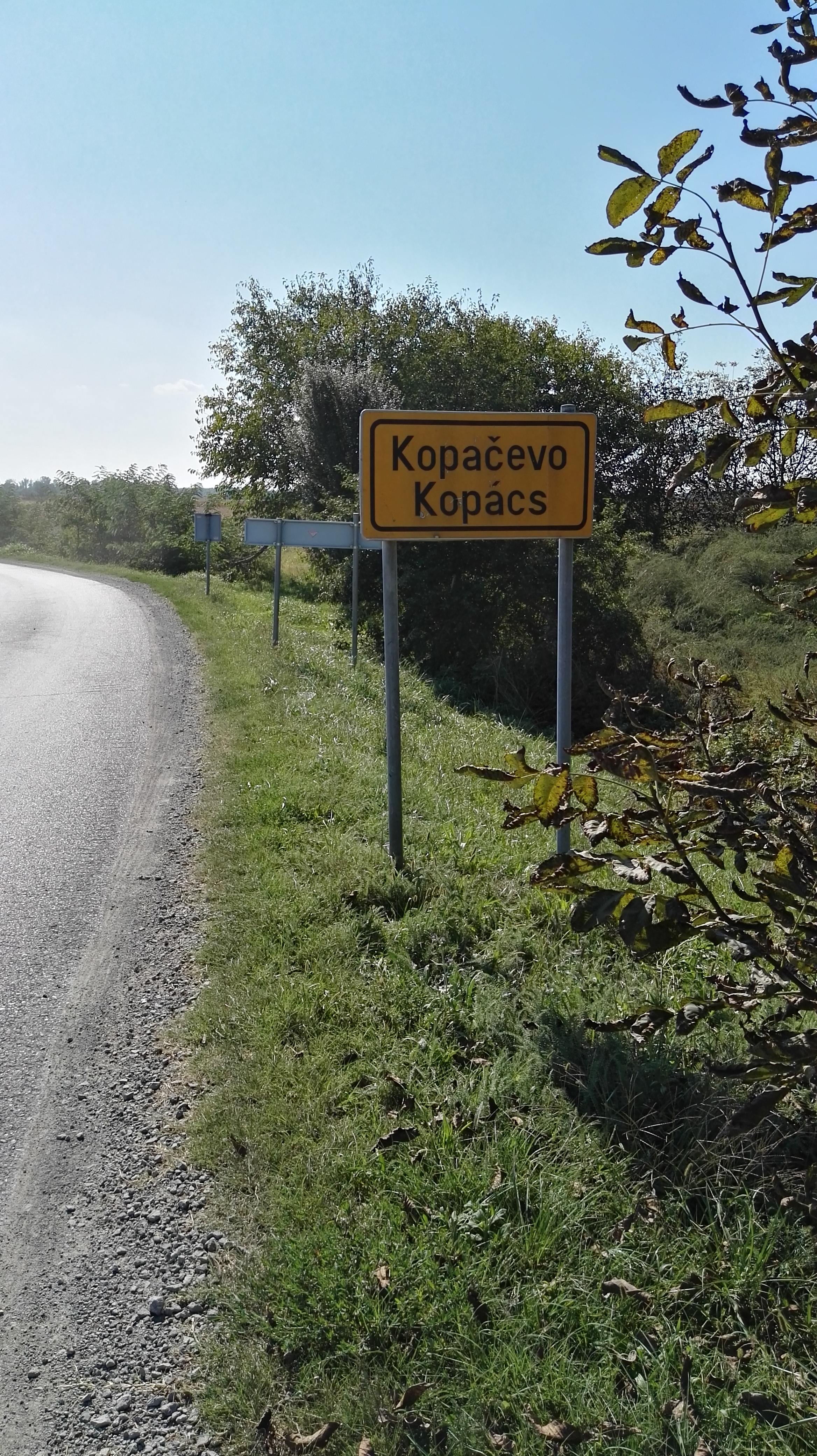 Srpskohrvatski / српскохрватски: Kopačevo tablica